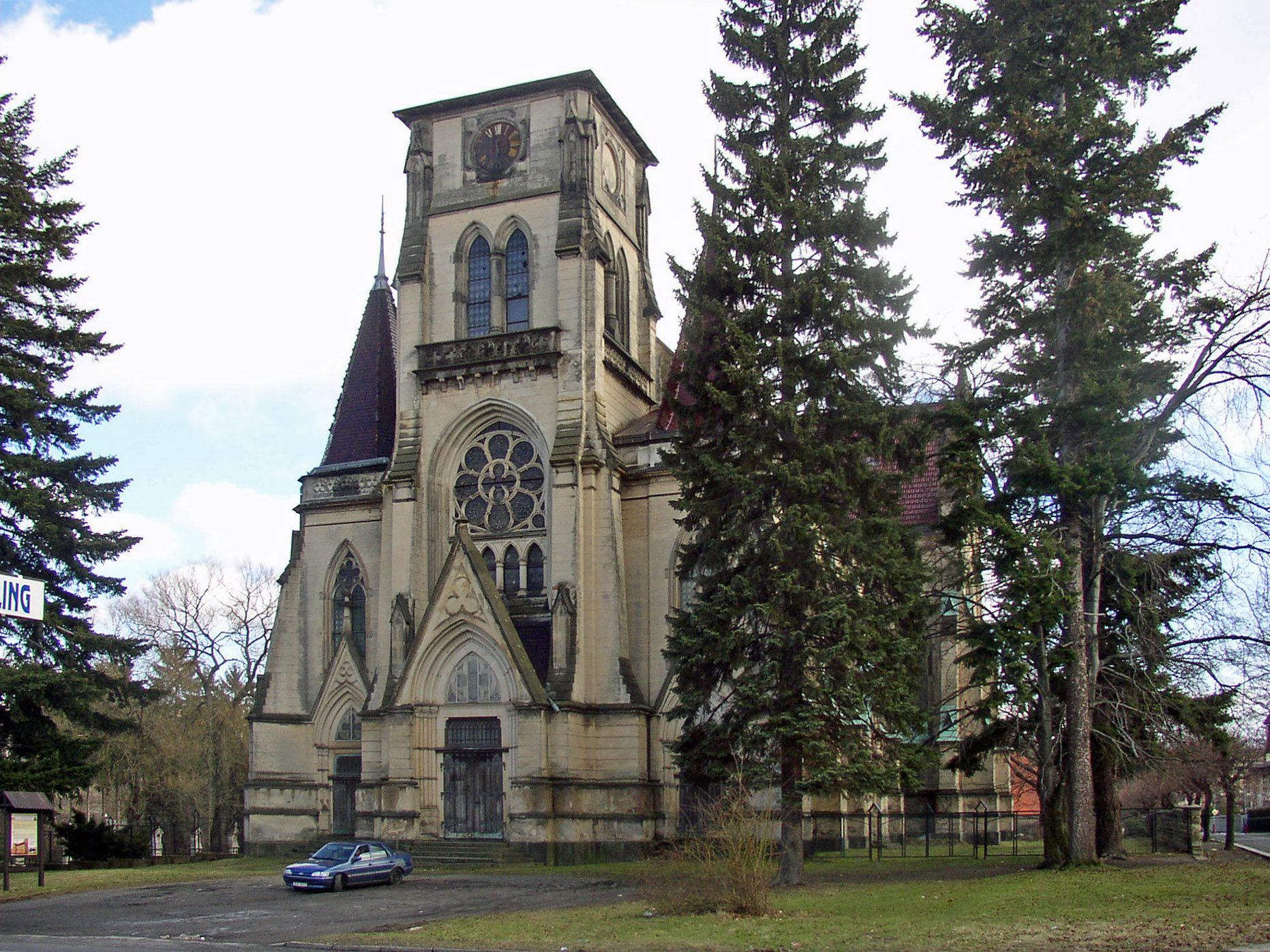 Kostel sv. Karla Boromejského, Varnsdorf, okres Děčín, Česká republika